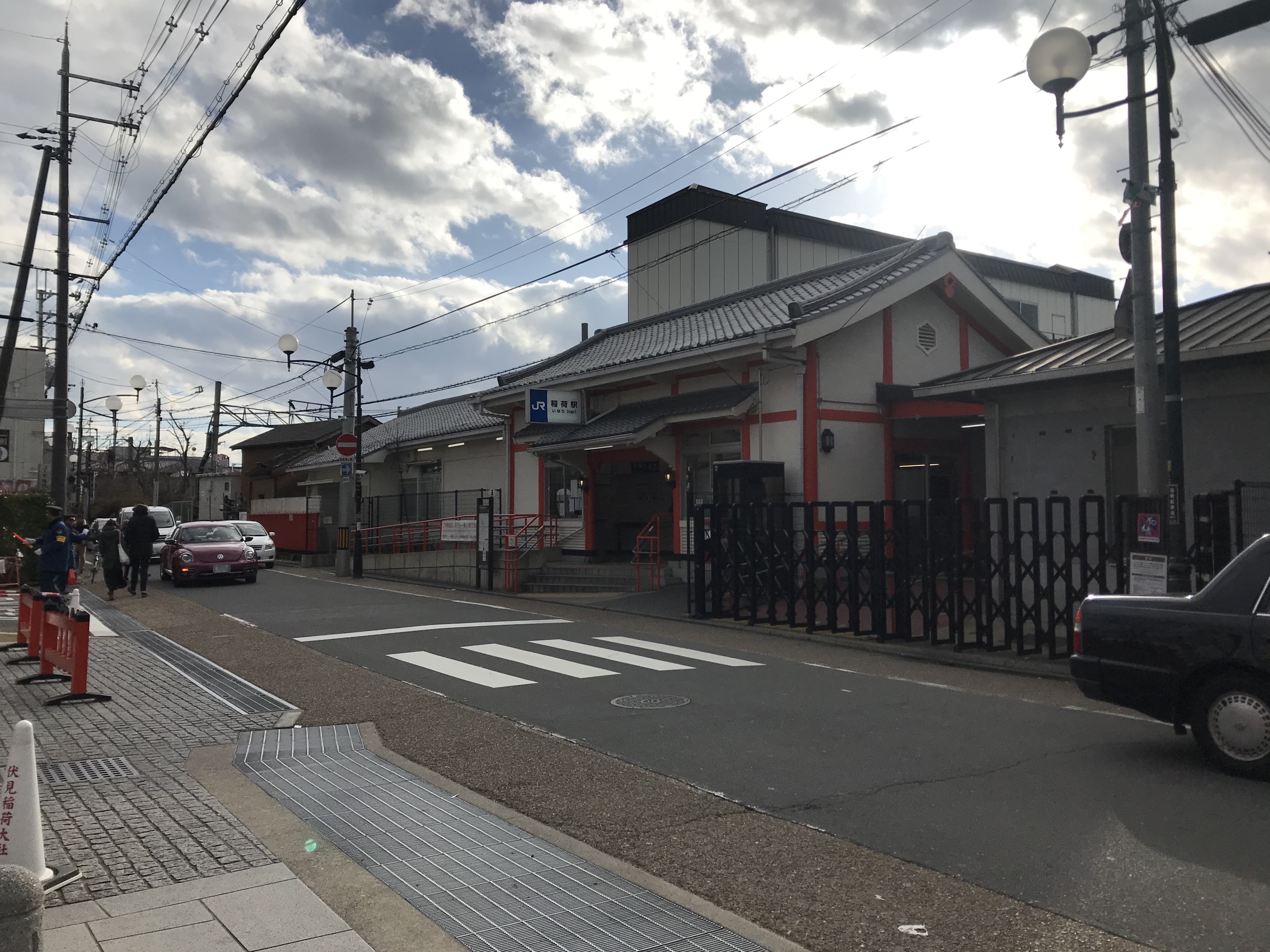 稲荷駅と駅前の京都府道201号